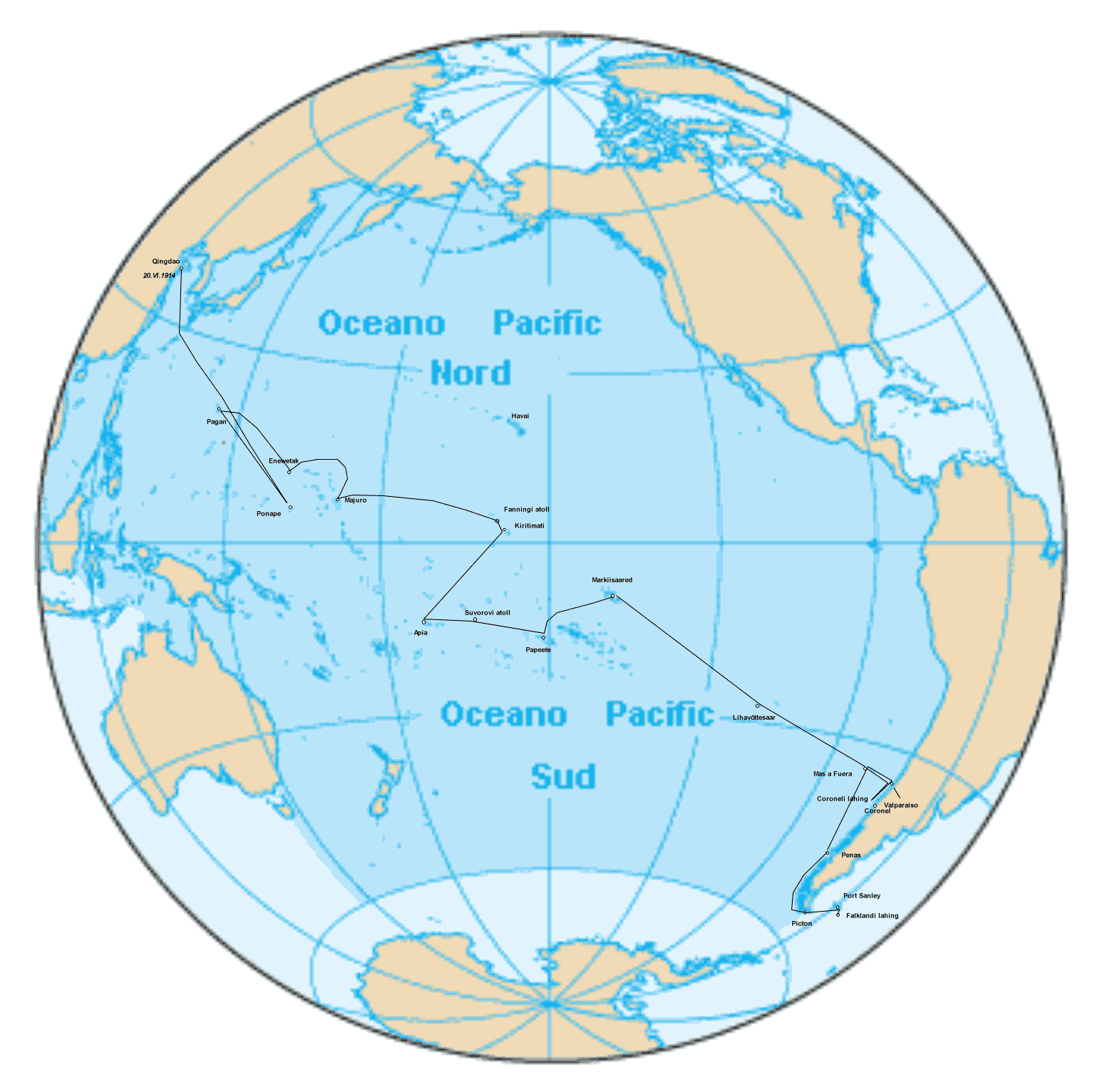 Spee eskaadri teekond Esimese maailma sõja ajal